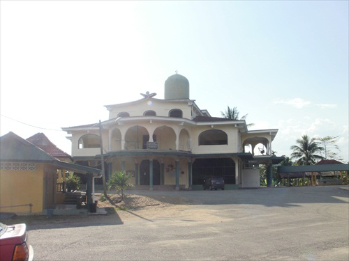 Masjid Mukim Sungai Peria